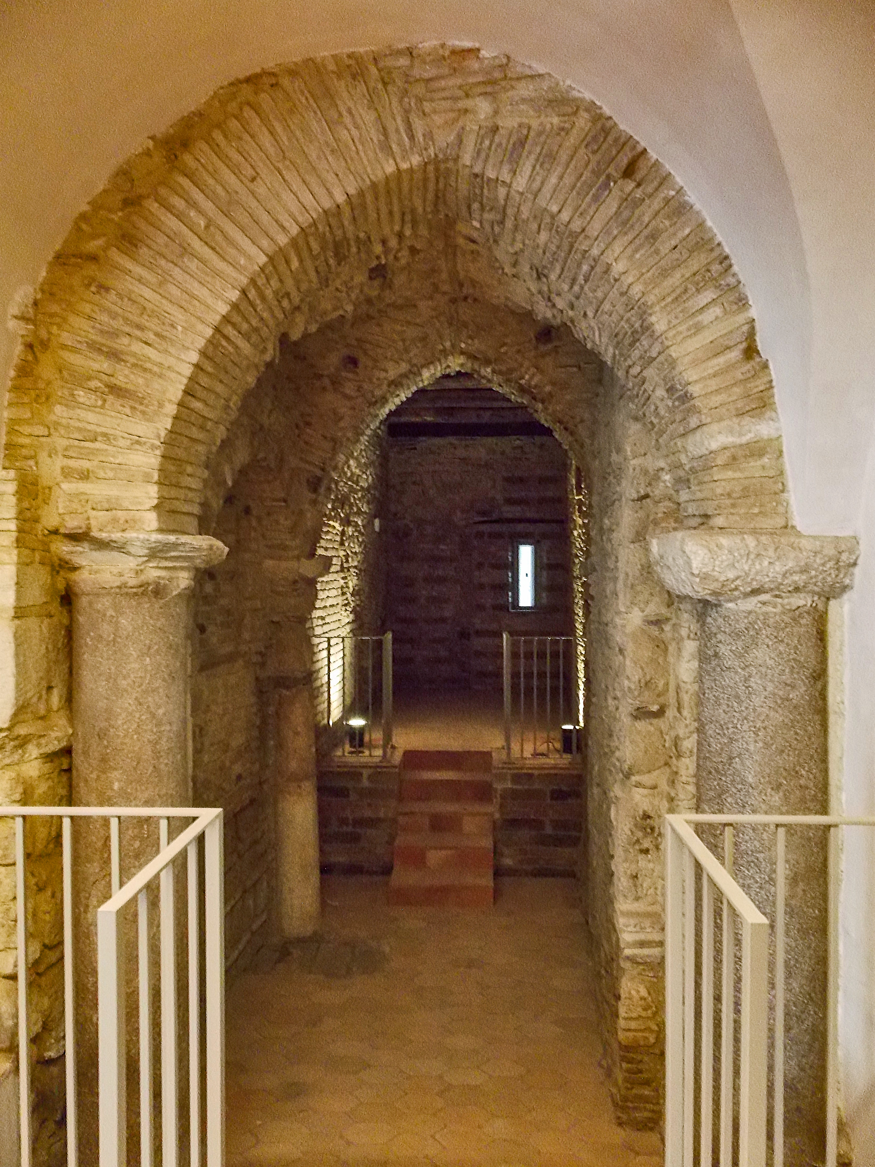 L'ex monastero benedettino di San Vittorino a Benevento. La zona recuperata per il Conservatorio Statale di Musica Nicola Sala